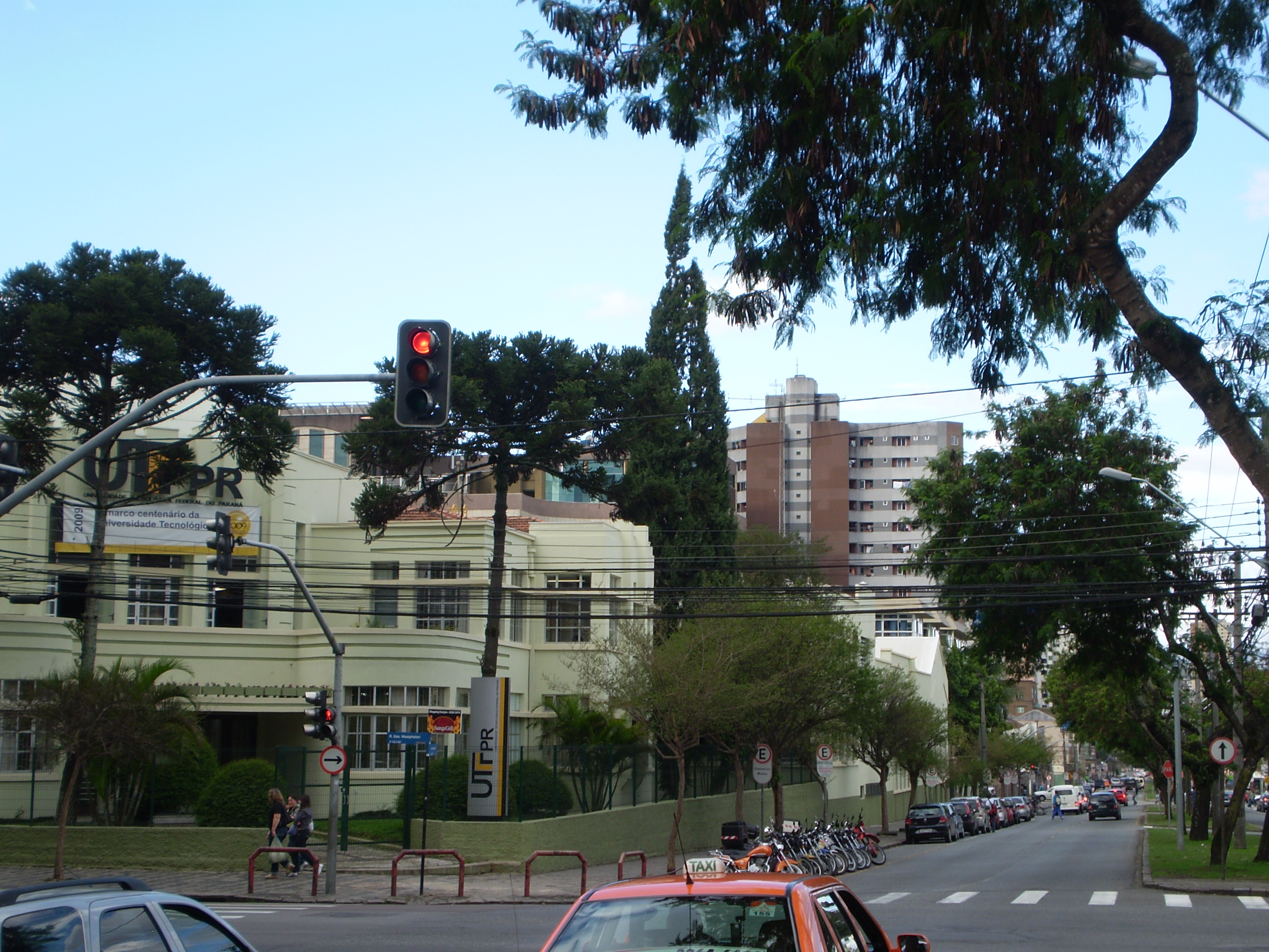 Esquina Av. Silva Jardim x Desembargador Westfalen - Curitiba